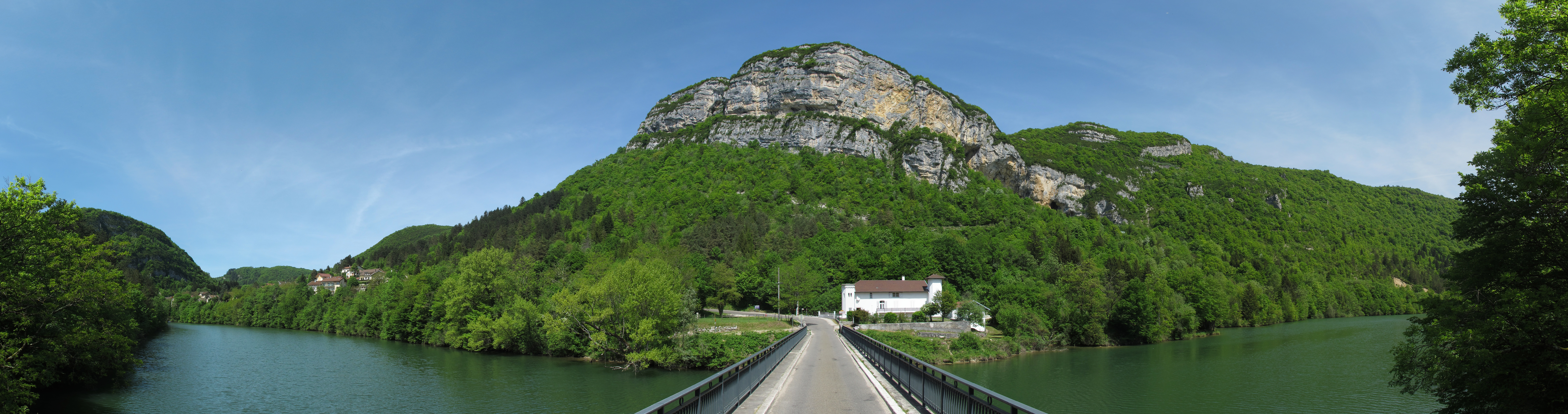 Pont de Chancia sur La Bienne avec falaises de Chancia ( Pierre Martin ? ). Image panoramique de projection cylindrique créée par logiciel hugin.